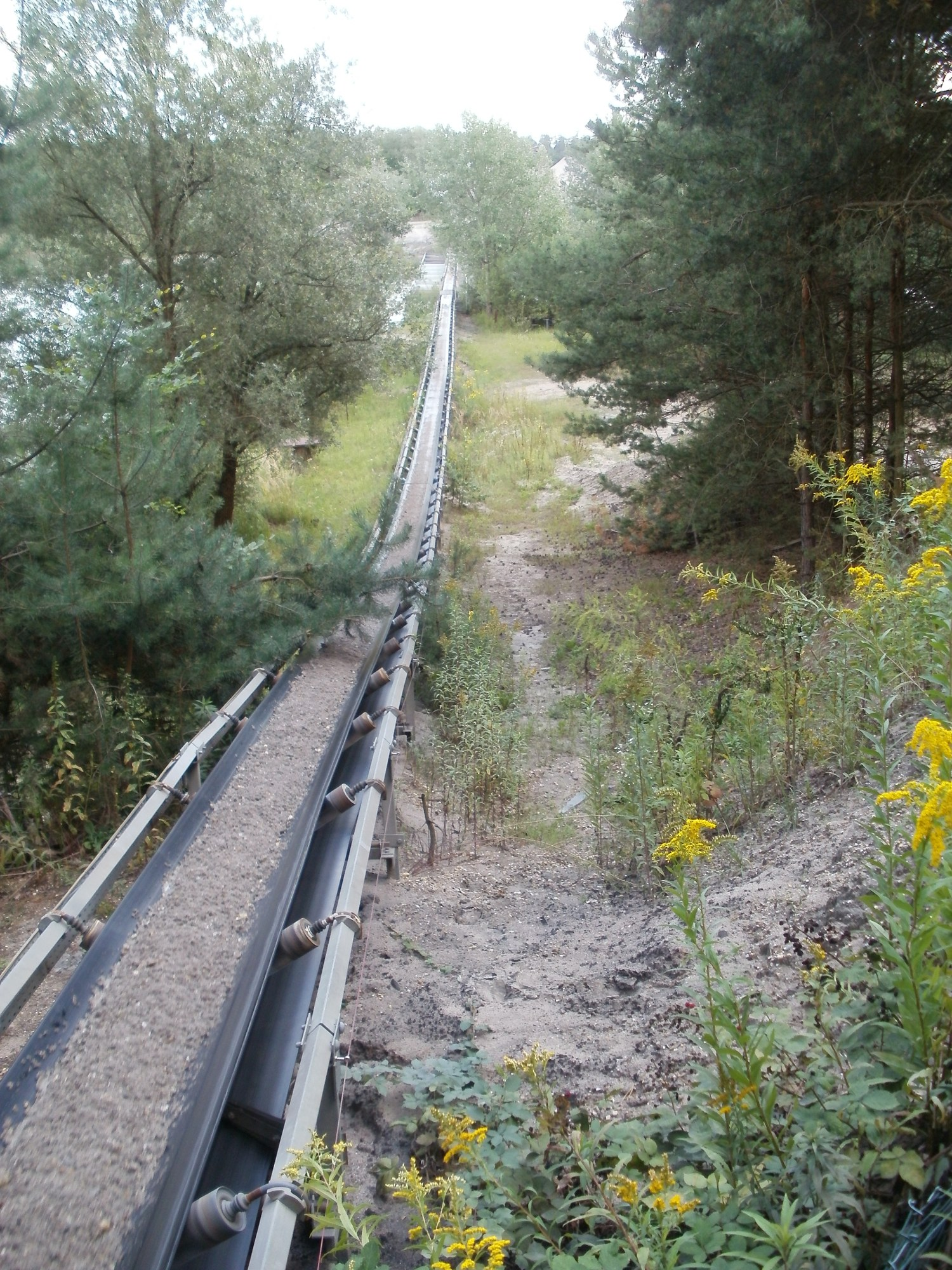 Kieswerk Kronau